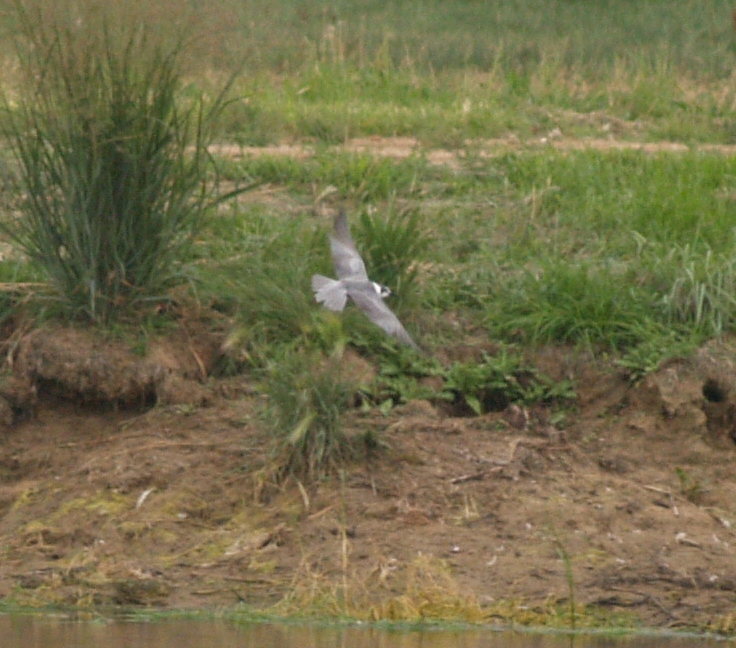 Black Tern Chlidonias niger surinamensis, juvenile plumage, Colorado.